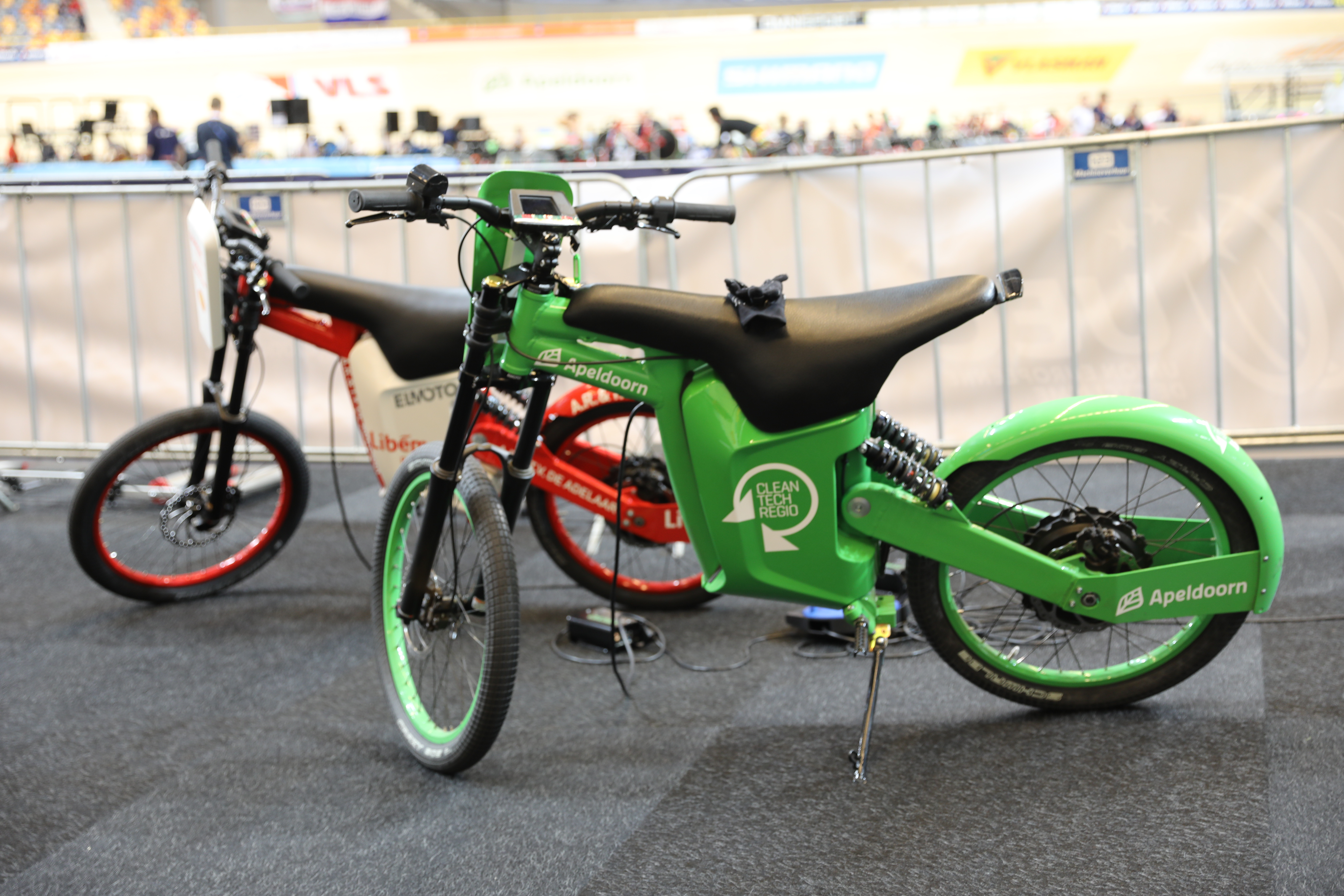 Elektro-Derny